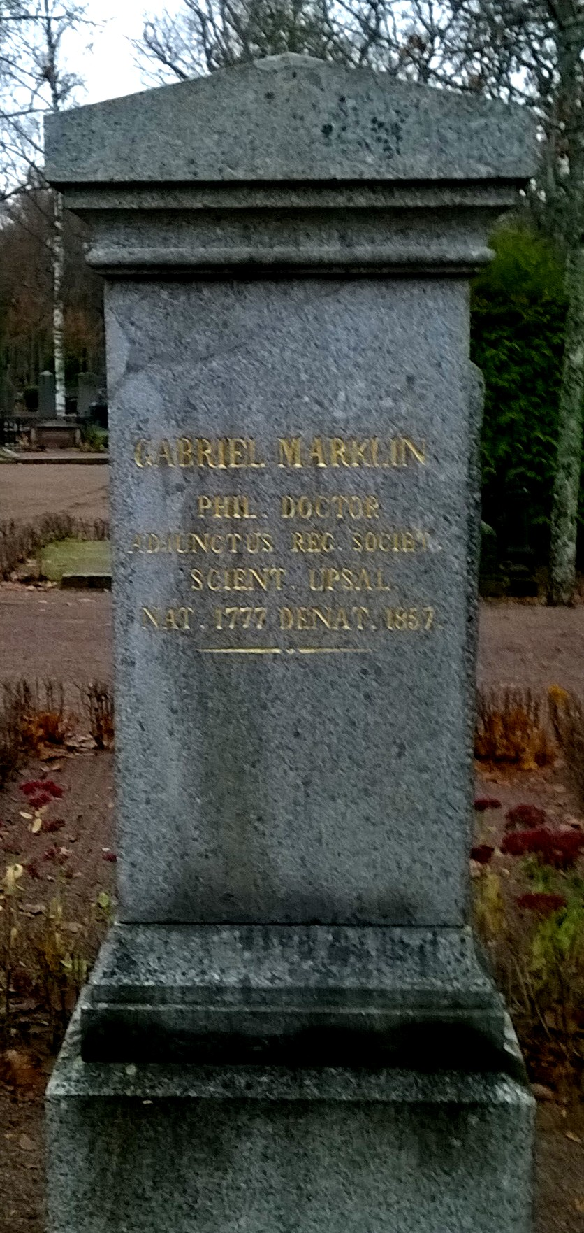 Naturforskaren vid Vetenskapssocieteten i Uppsala, Gabriel Marklins grav.